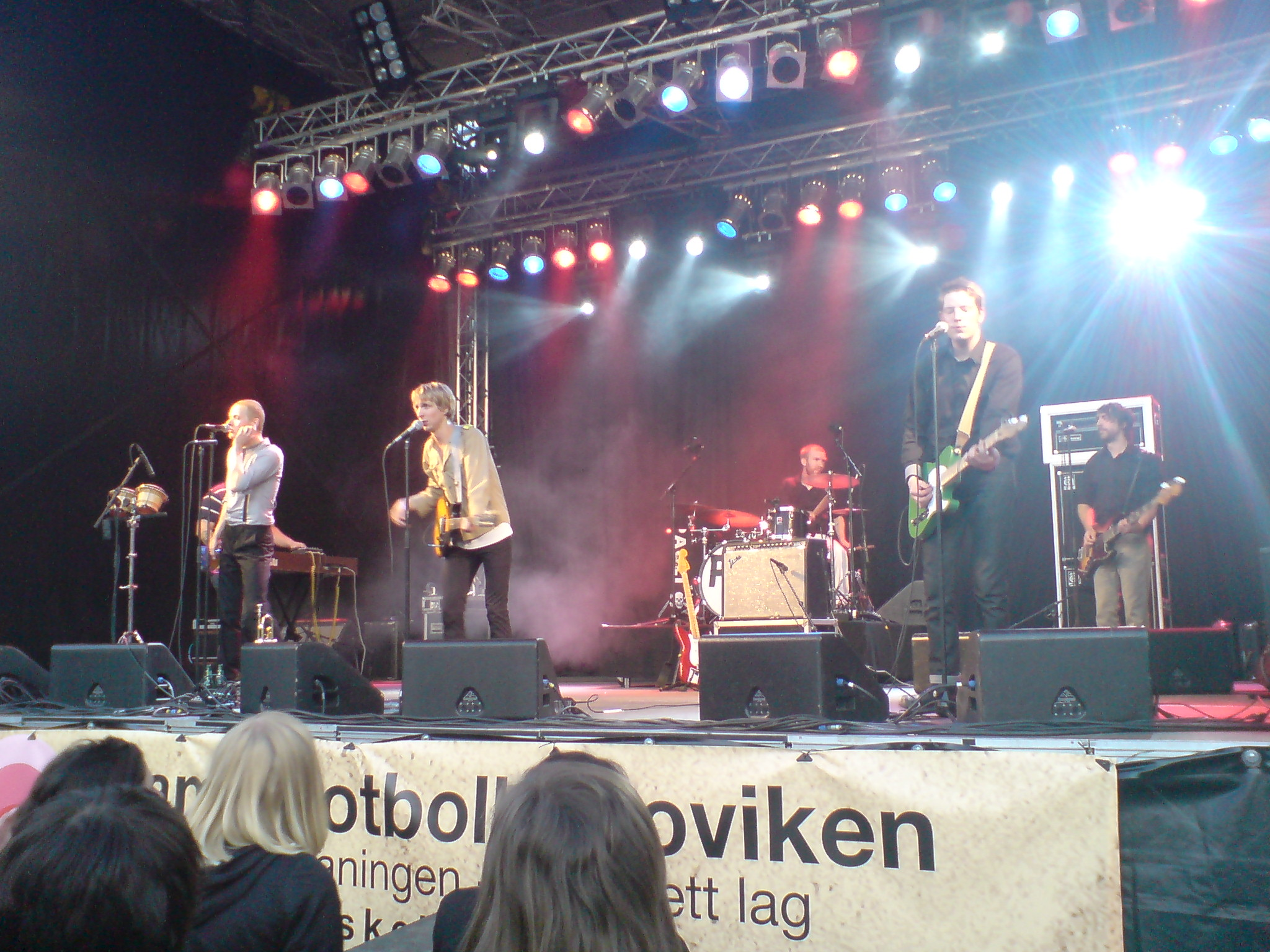 Florence Valentin på en spelning på Stadsfesten i Skellefteå den 28:e juni 2008.